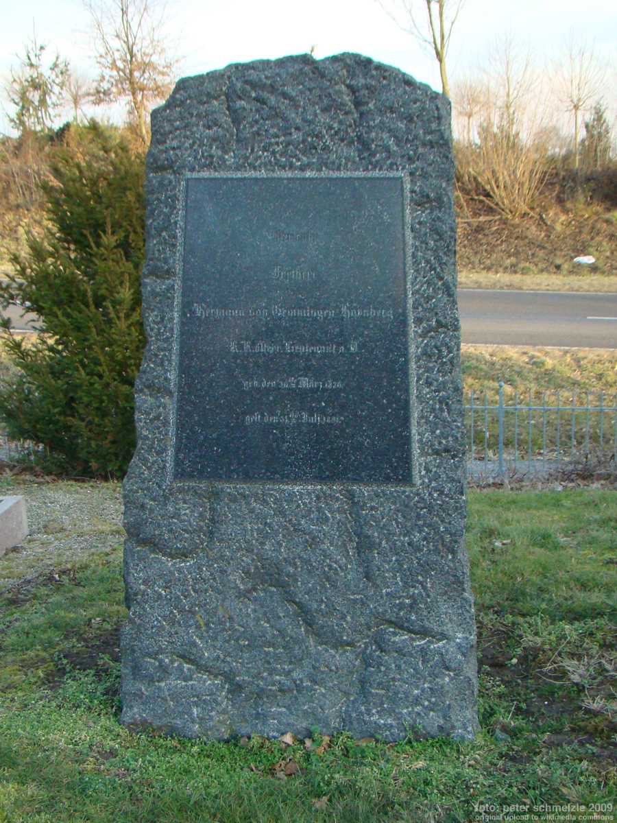 Grabmal für Freiherr Hermann von Gemmingen-Hornberg (1820-1891) in der Familiengrablege der Freiherren von Gemmingen in Bad Rappenau-Babstadt